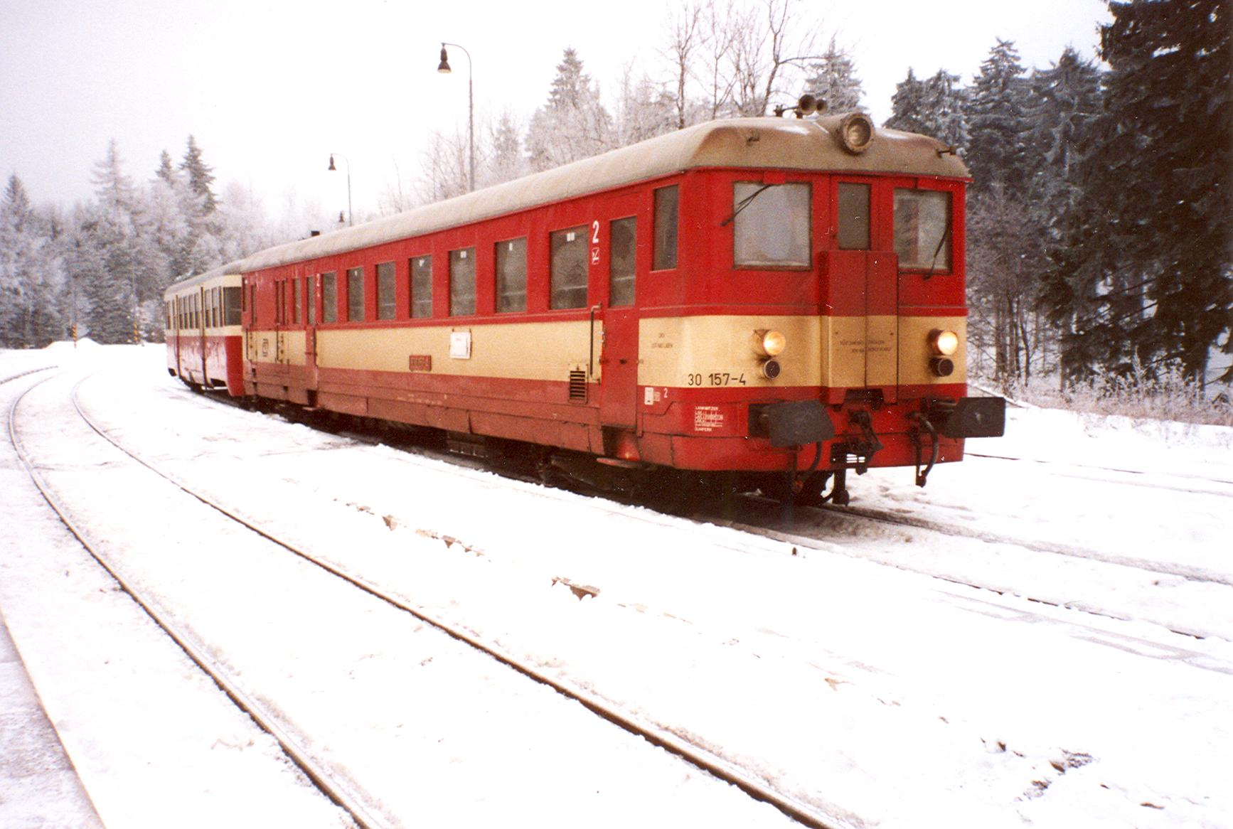 830 157 als Eilzug von Decin in Jedlova im Dezember 2003